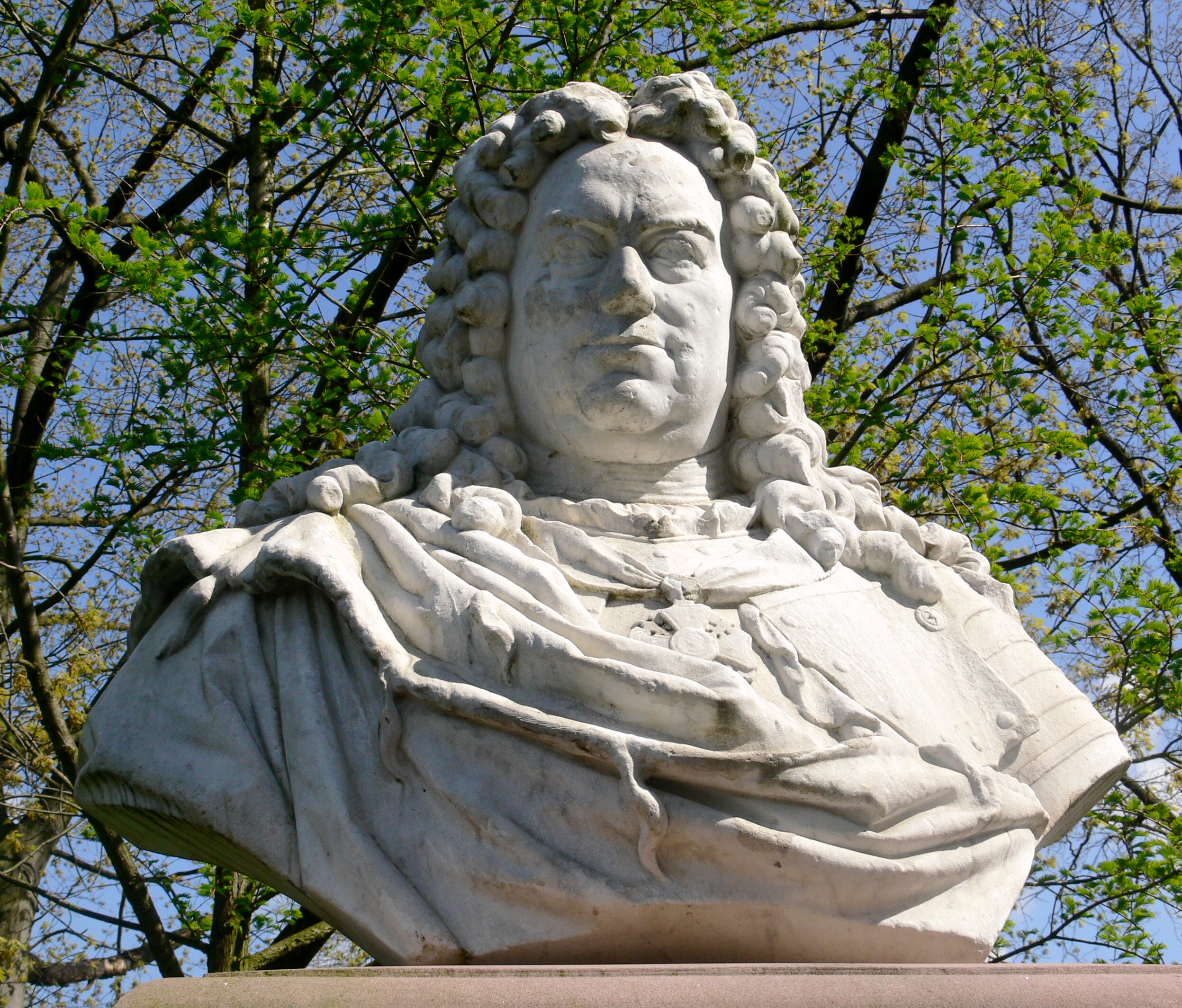 Eisenberg (Thüringen) Schlosspark, Denkmal Christian von Sachsen-Eisenberg